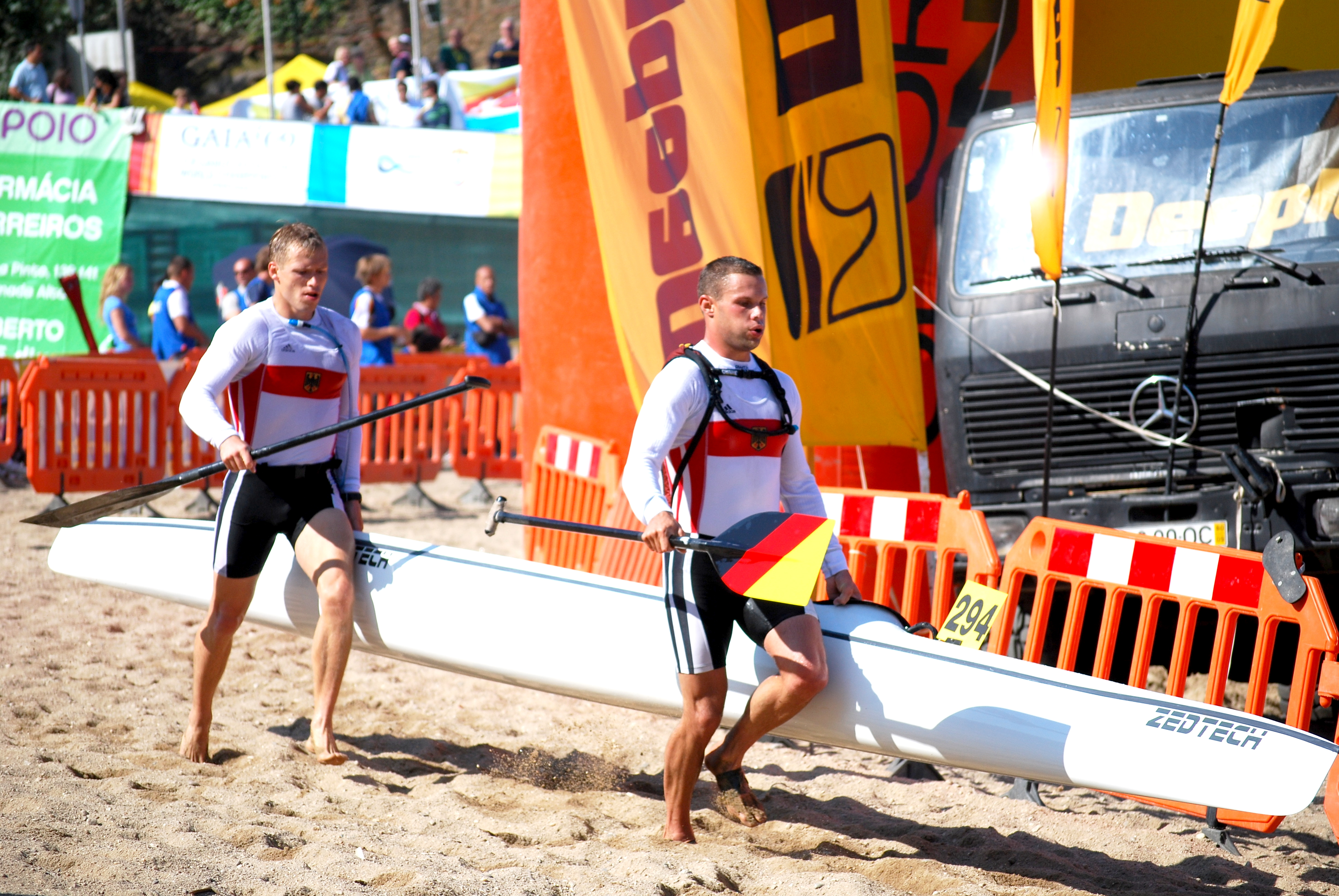 Breuing und Ebhardt im Rennen der Zweiercanadier bei der Marathon-WM 2009 in Portugal